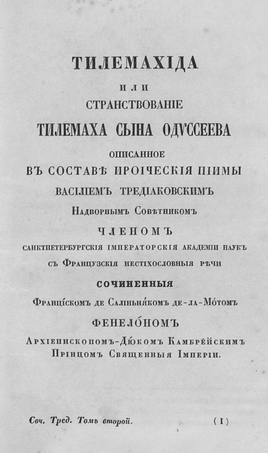 Титульный лист "Тилемахиды", том второй